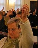 Zuzana Domesová (2004)